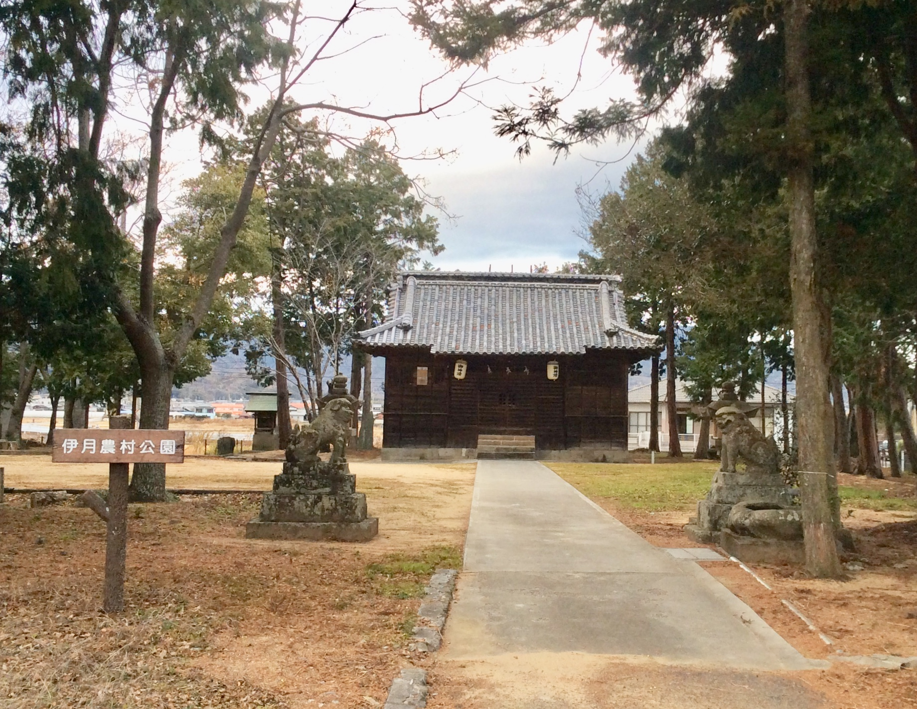 事代主神社（阿波市）